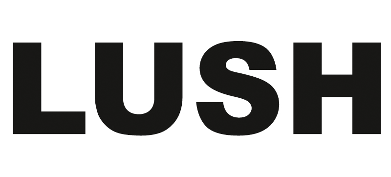 Logo